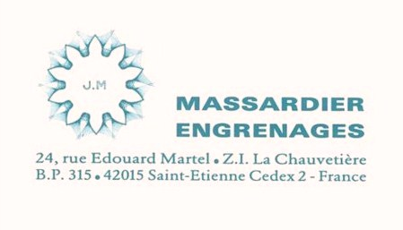 logo et carte